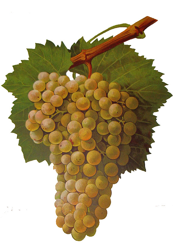 Grappe de Gros bourgogne par Viala et Vermorel